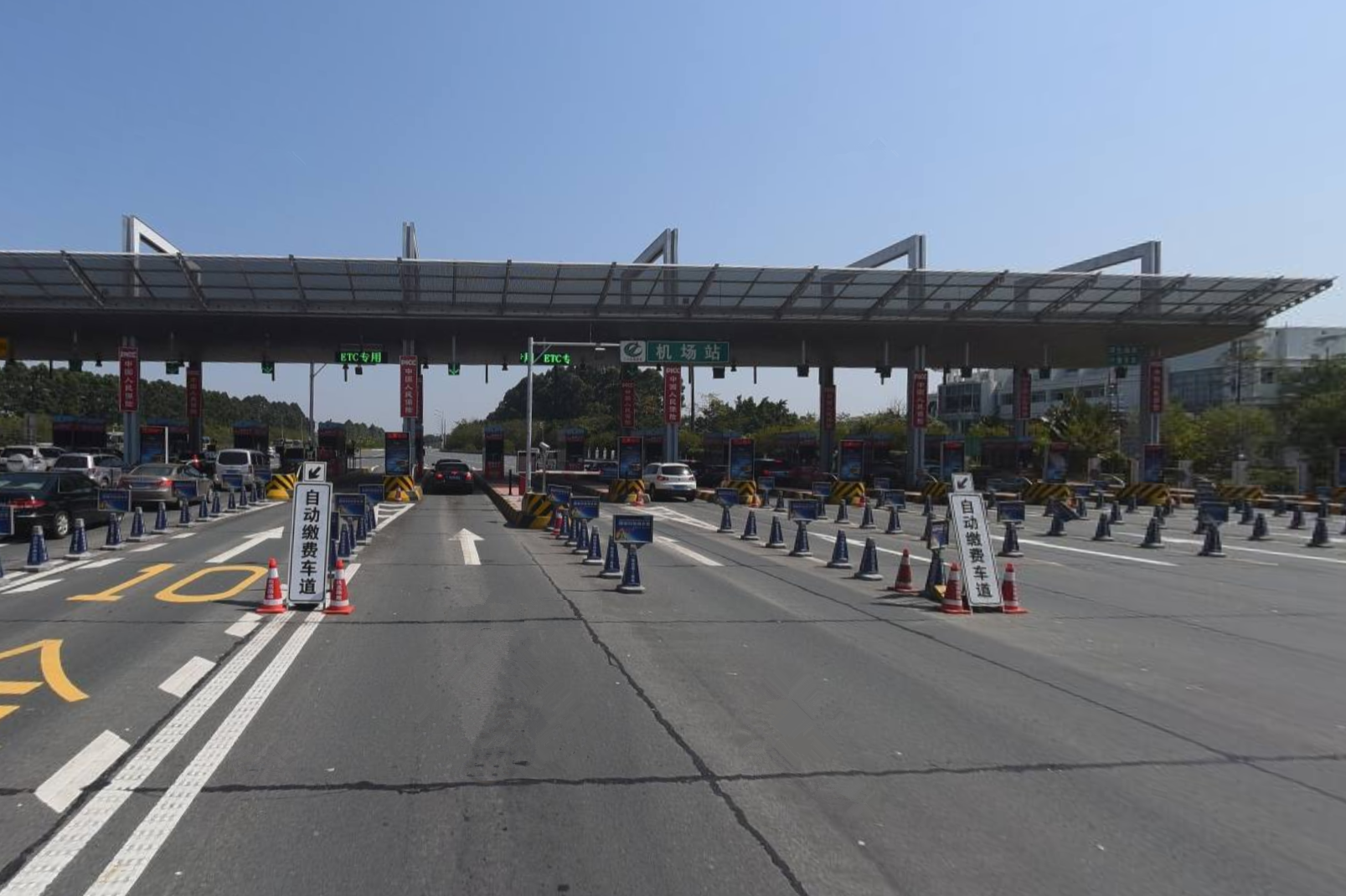 中文（香港）: 廣州機場高速收費站